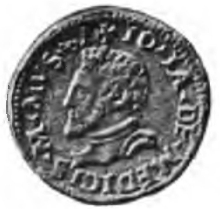 "Rivista italiana di numismatica", a numismatic magazin of "Società Numismatica Italiana"